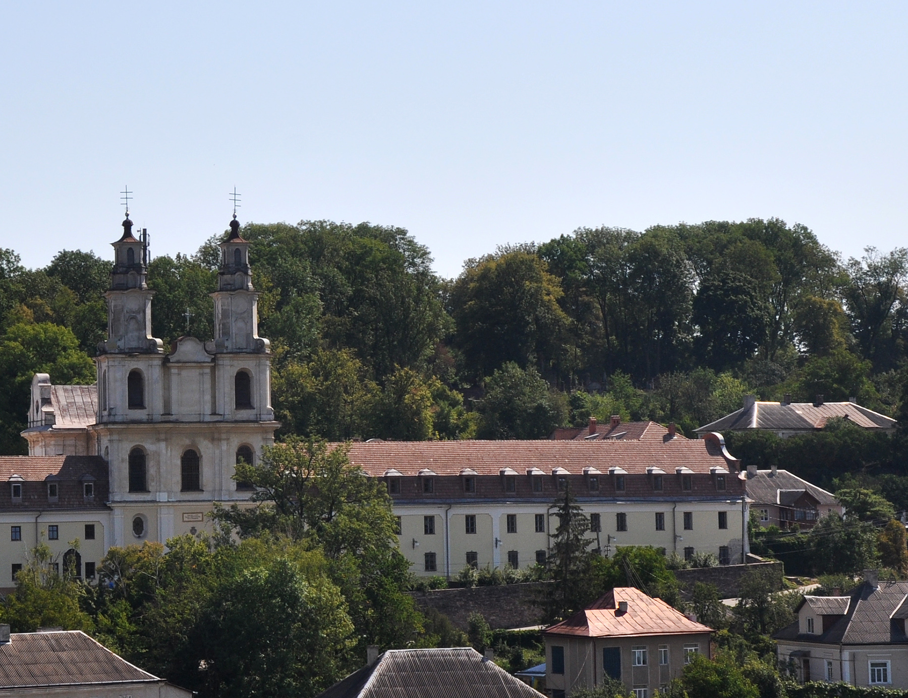 Приміщення Бучацького колегіуму (давніше гімназії, Місійного інституту) (південний корпус, зліва церкви), Монастирські келії (північний корпус) Бучач, вул. А. Міцкевича, 19